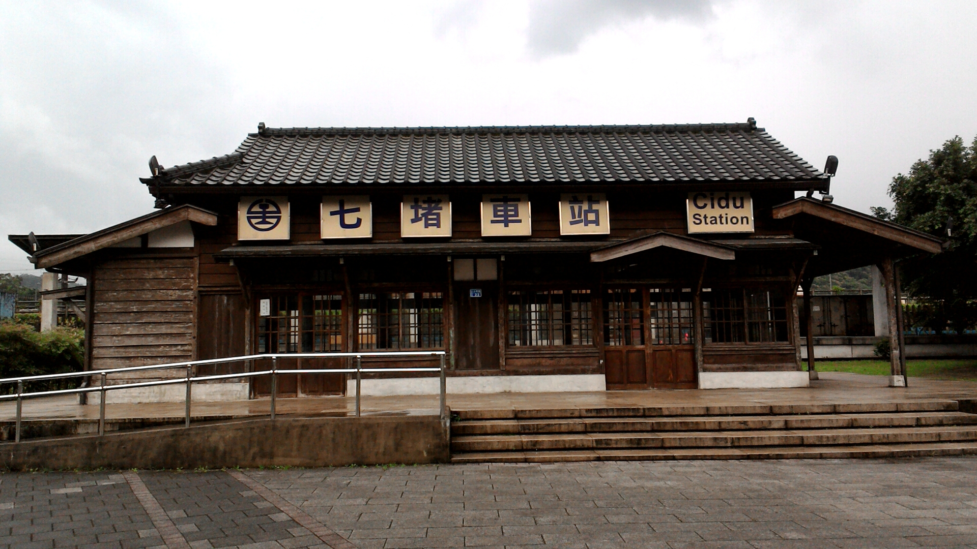 台鐵七堵前站舊站房,基隆市七堵區長興里